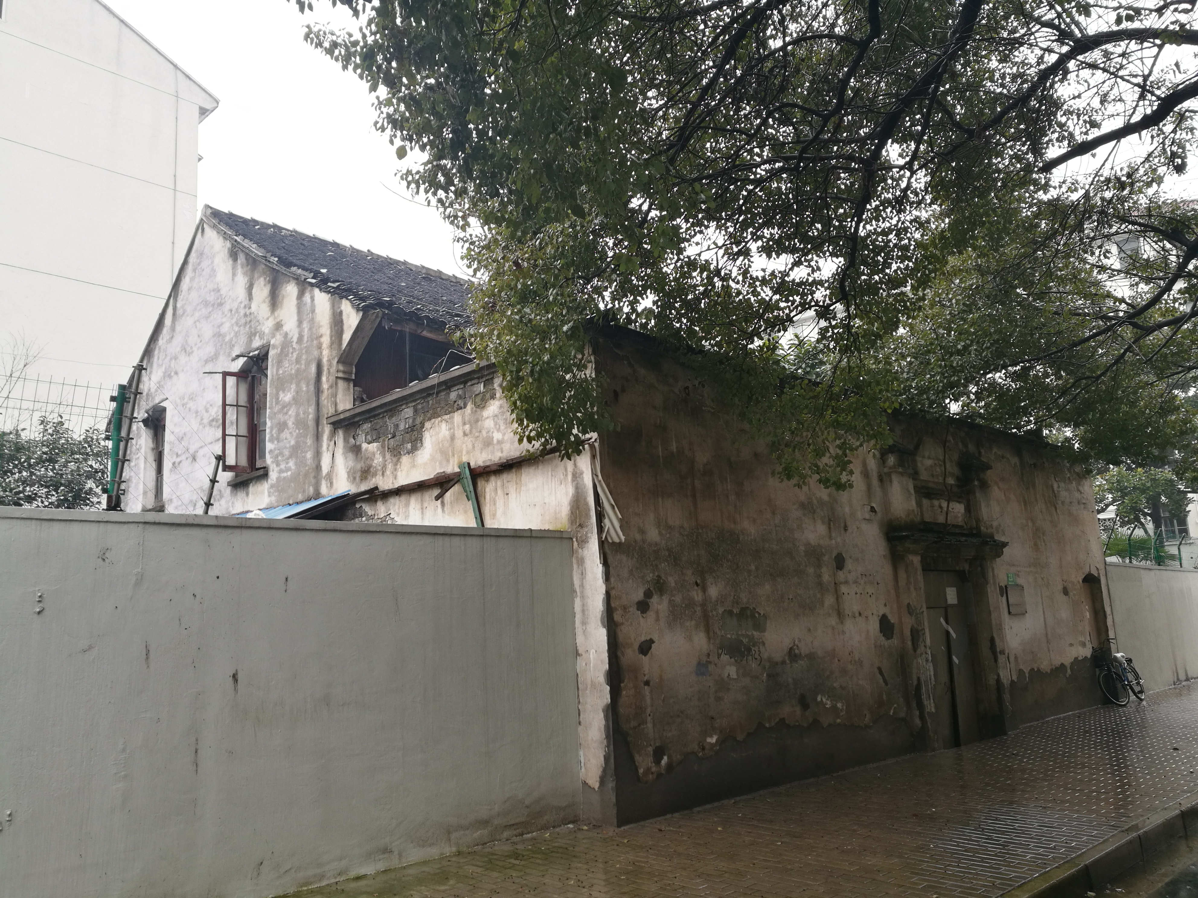 位于江川路街道的慕莲精舍